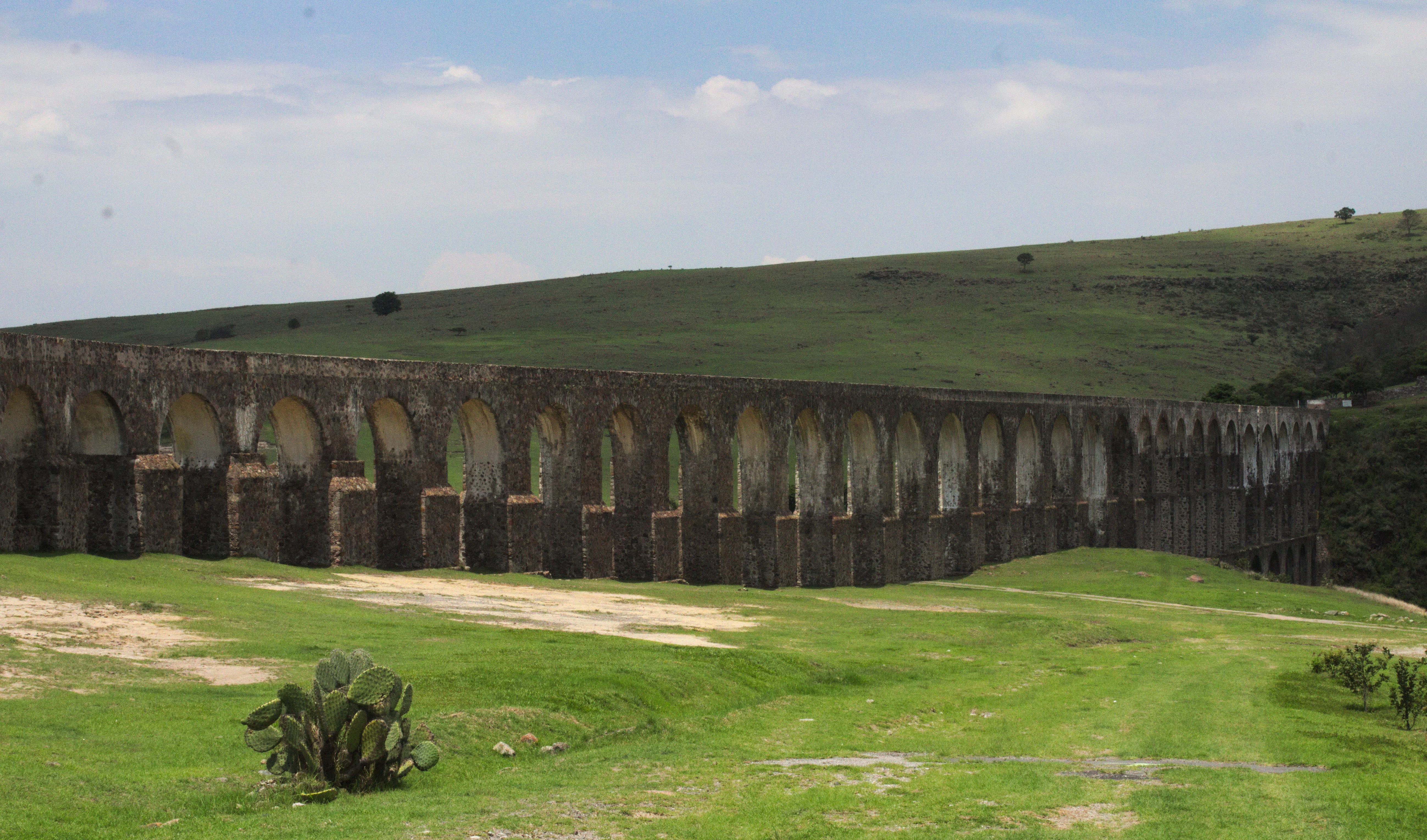 Fotografía en los Arcos del Sitio, Estado de México.